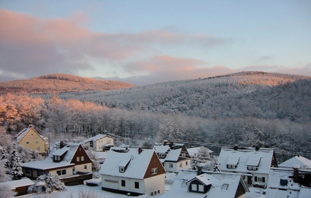 Martinshardt von Kreuztal aus gesehen